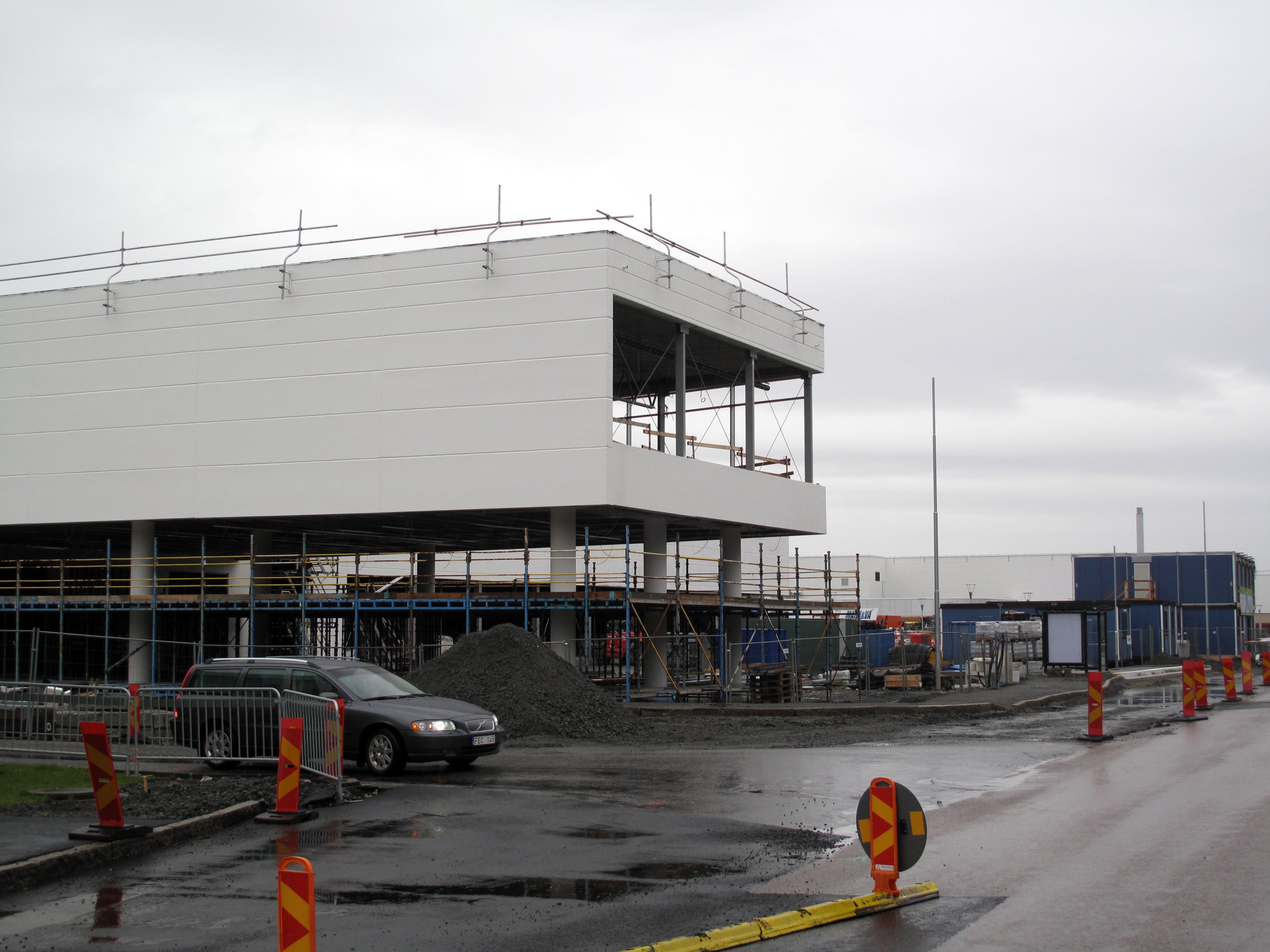 Torpavallens handelsplats under byggnad hösten 2012.